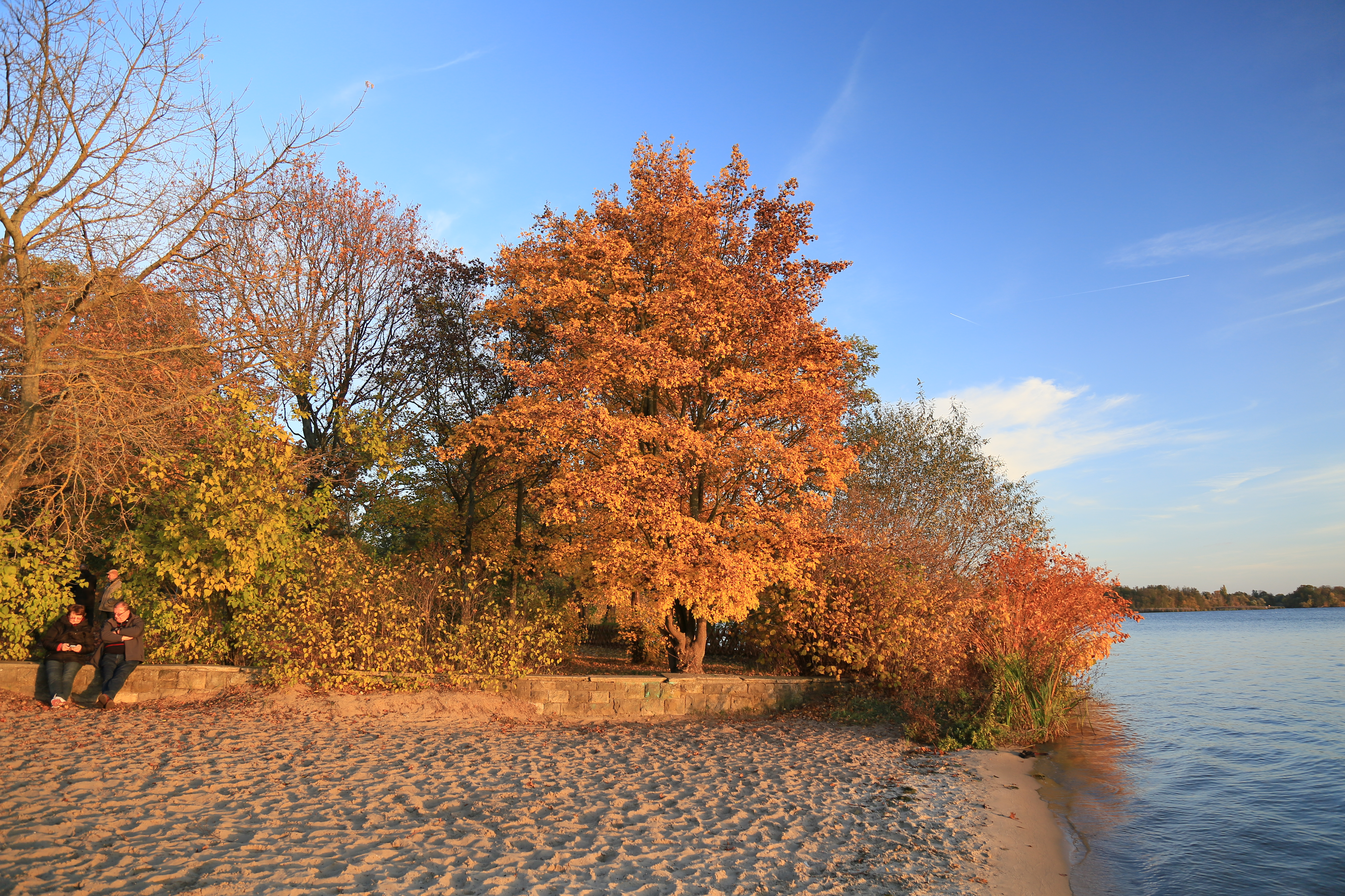 Goldener Spätherbst am FKK-Strand Müggelsee